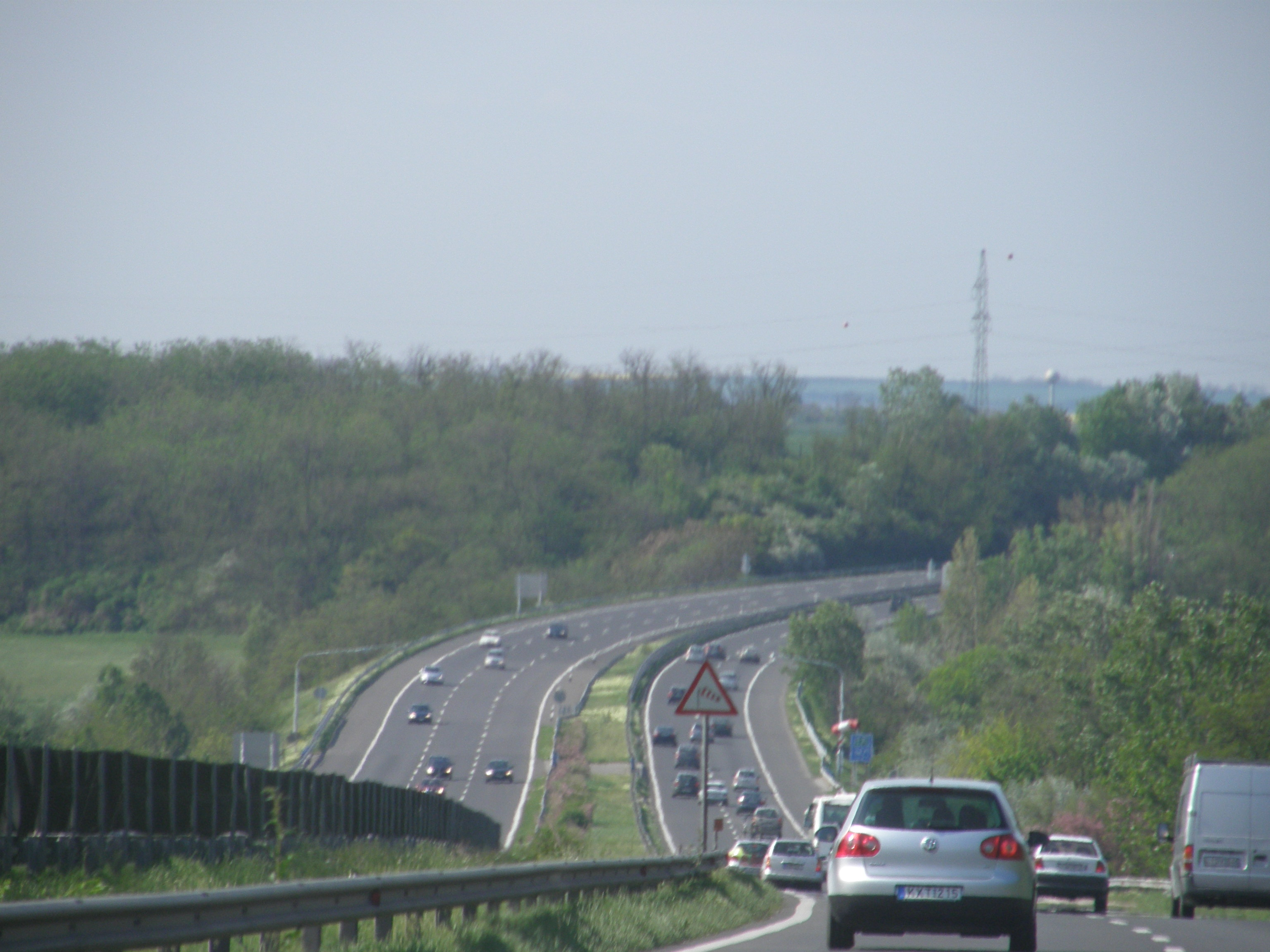 Motorway M7 - Hungary